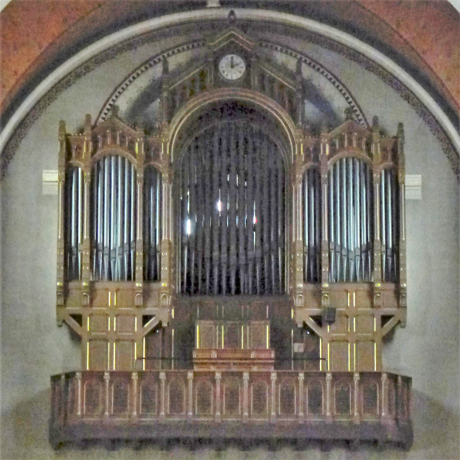 Église Notre-Dame de la Gare (orgue) - Paris XIIILa partie instrumentale de l'orgue de cette église est classée monument historique au titre des objets depuis le 20 juin 19891 (voir ici (référence PM75002444), base Palissy, Ministère de la Culture, 2 février 1994. Consulté le 24 novembre 2008).